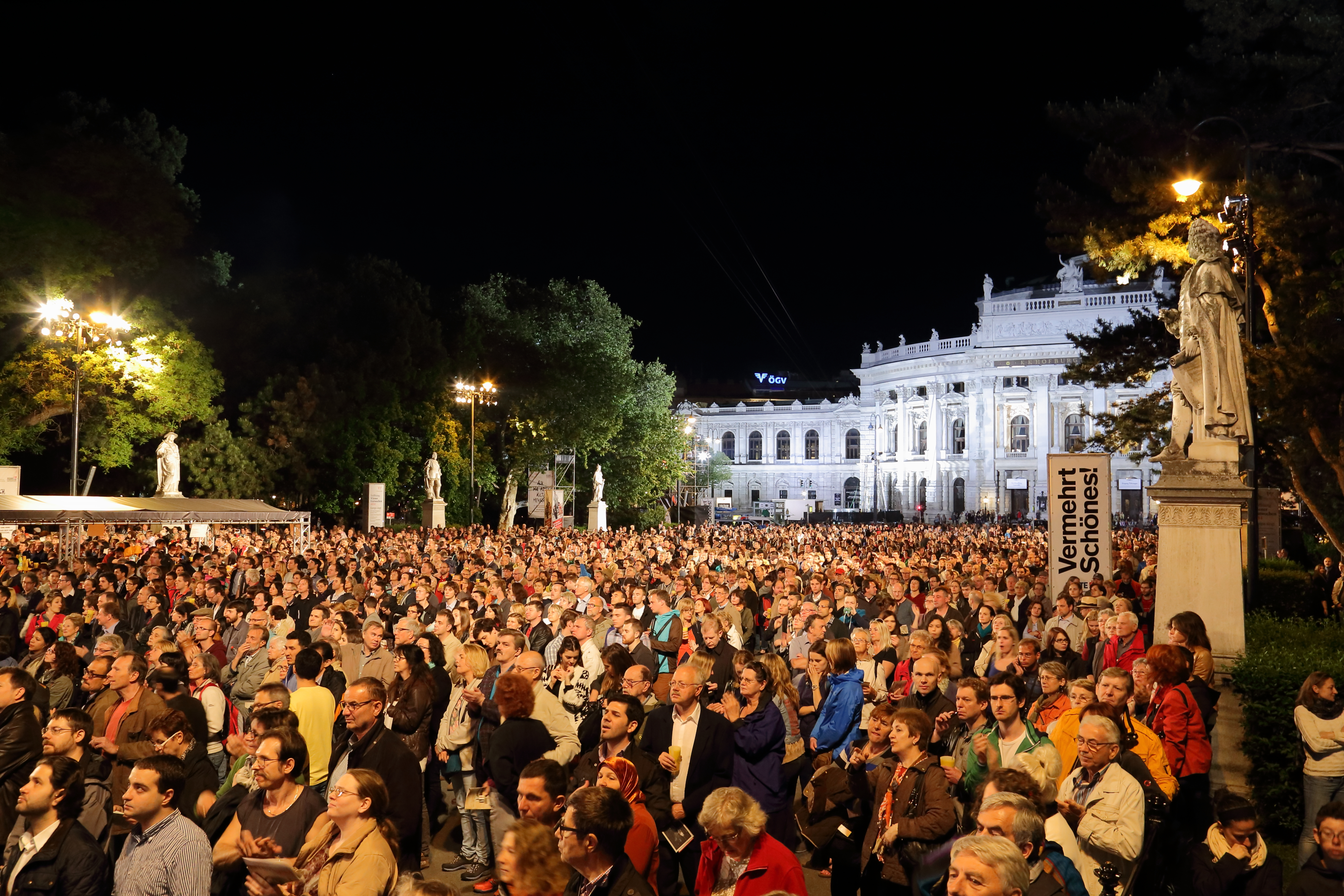 Blick Richtung Burgtheater bei der Eröffnungsveranstaltung der Wiener Festwochen 2014 am 9. Mai.